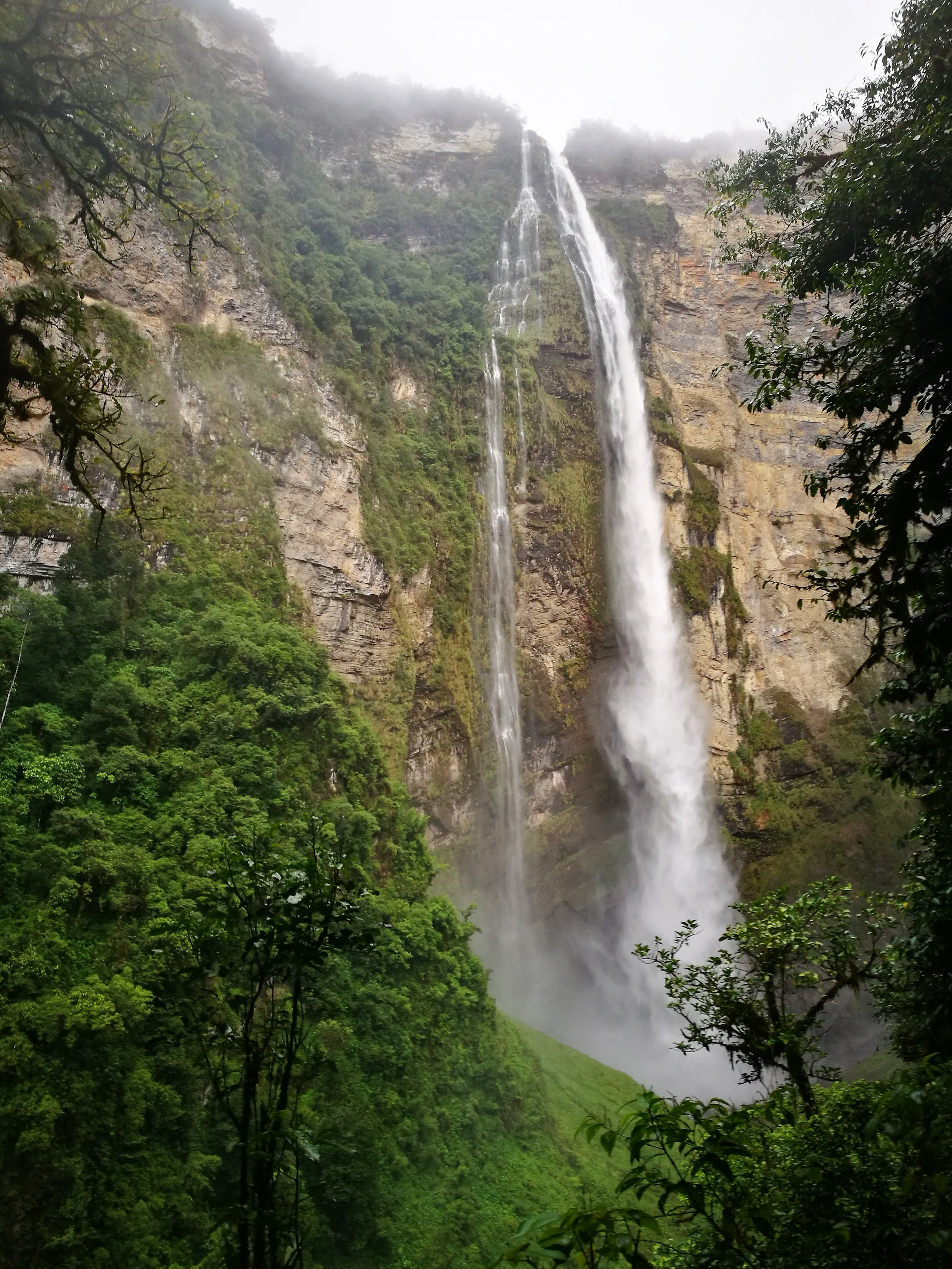 Segona caiguda del Gocta